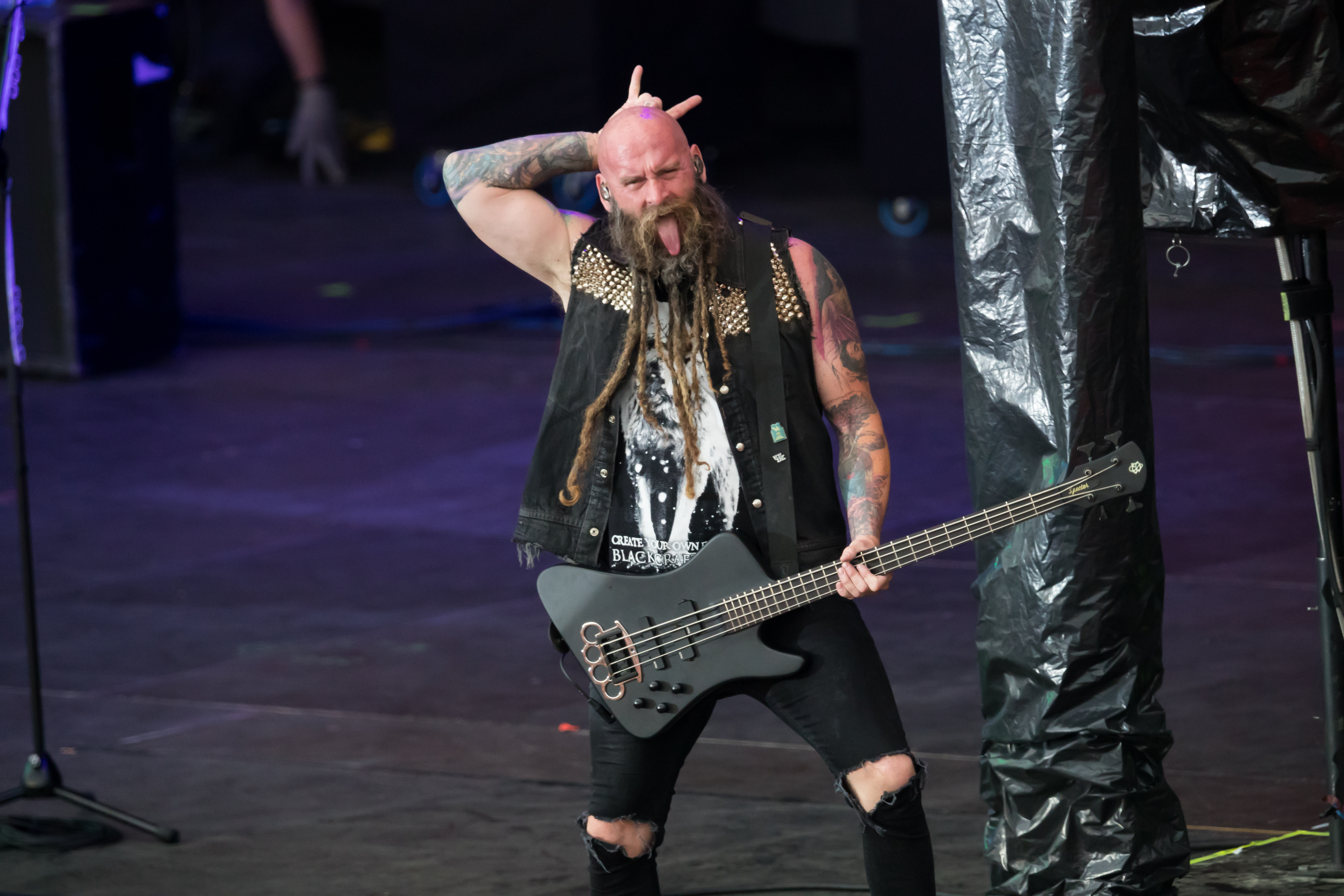 Five Finger Death Punch during Rock am Ring at Nürburgring, Nürnburg, Rheinland Pfalz, Germany on 2017-06-02, Photo: Sven Mandel